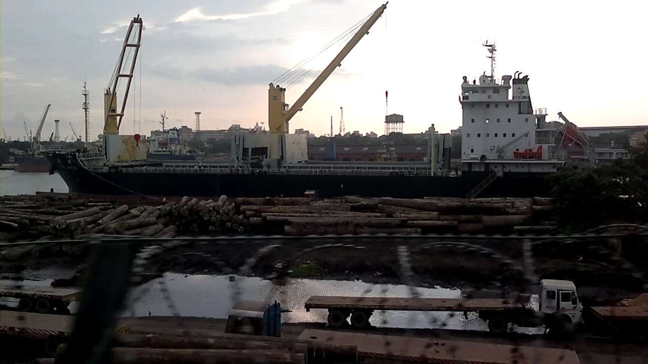 Khidirpore dock